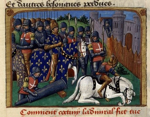 Le siège de Cherbourg, par Martial d'Auvergne, enluminure issue de l'ouvrage Vigiles de Charles VII, Paris, France, XV°siècle.